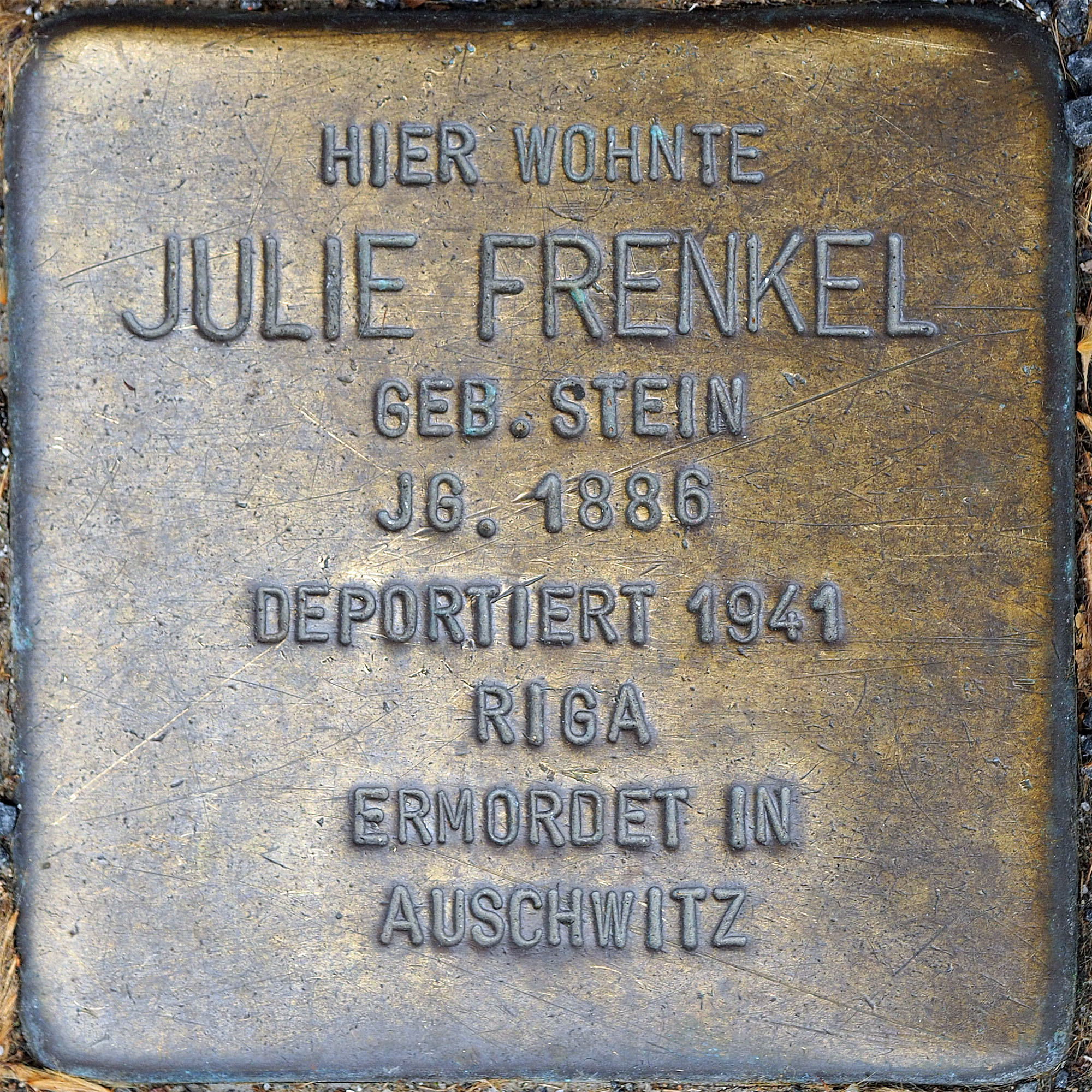 Stolpersteine MG: Frenkel, Julie